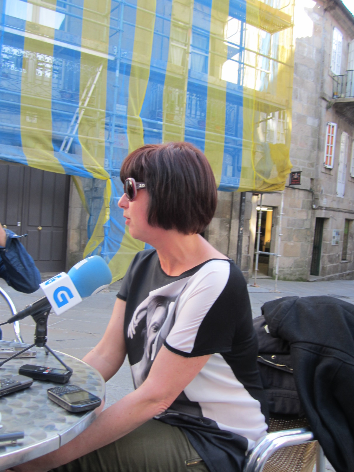 Blanca Cendán, na rolda de prensa na que explicou o seu cesamento o 23 de marzo do 2012.